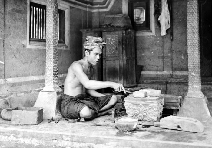 Repronegatief. Goudsmid aan het werk, kampong Mas (goud kampong), Bali